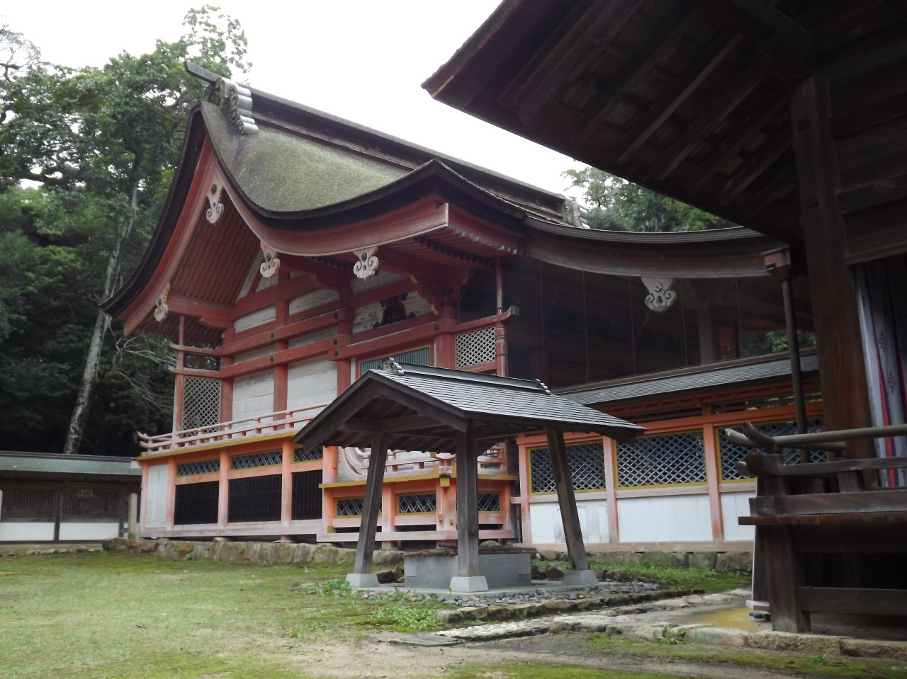 大山祇神社の本殿